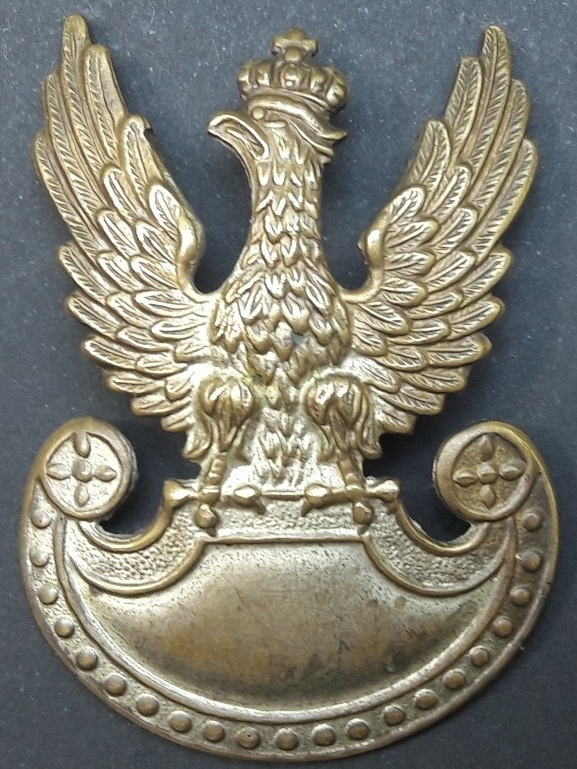 Orzełek na czapkę II RP. Pamiątka po gen. bryg. Stefanie Kosseckim